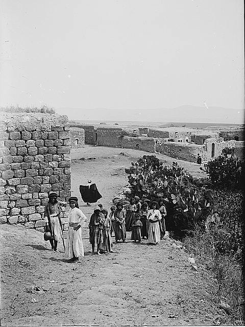 Sulam